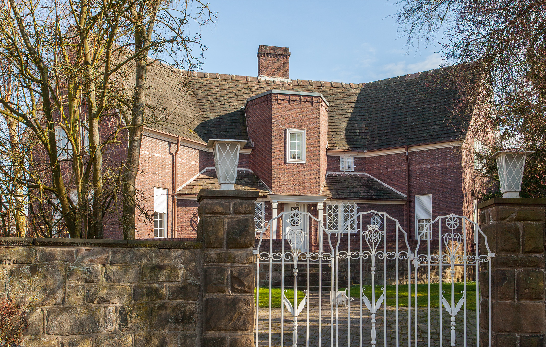 Schötmar (Bad Salzuflen), Schülerstr. 26, (Architekt: Gustav Meßmann) This is a photograph of an architectural monument.